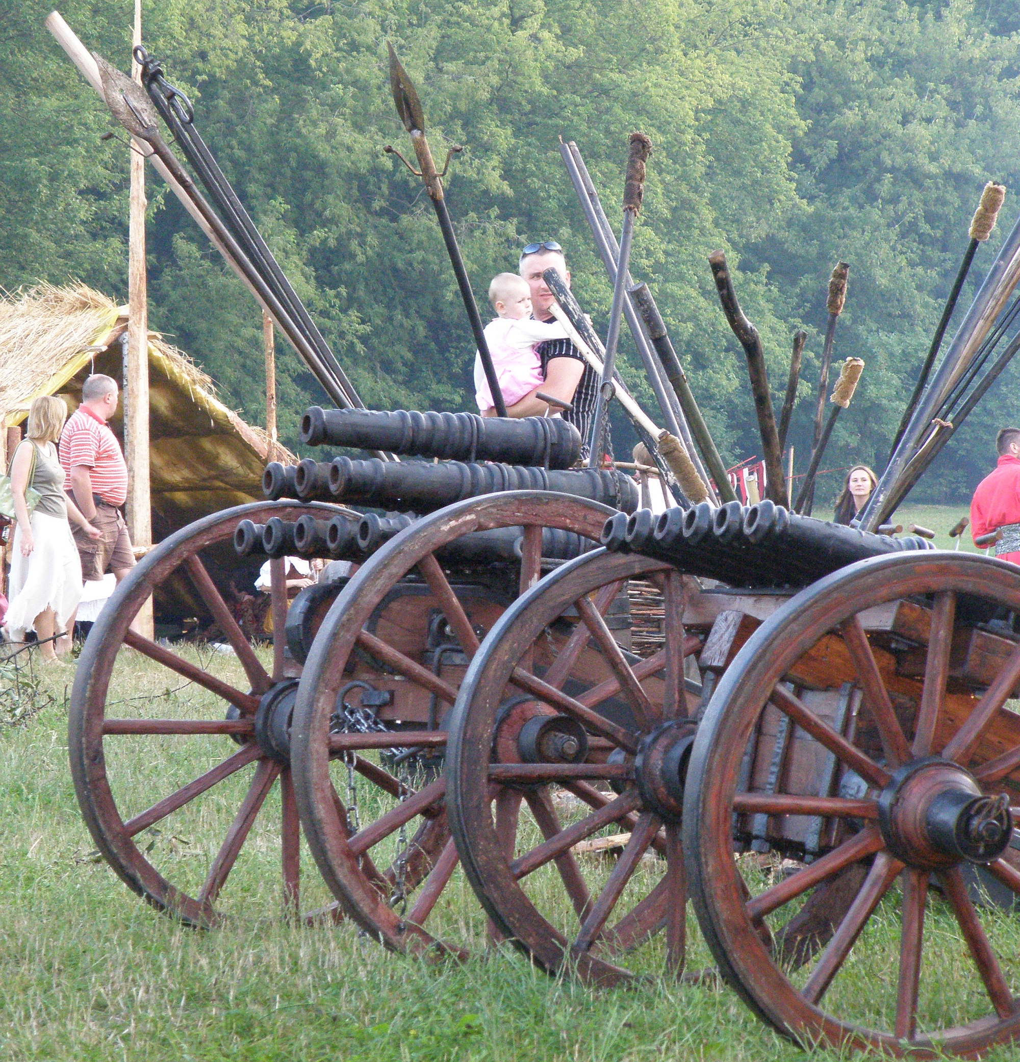 Warszawa, Park Skaryszewski, bitwa polsko-szwedzka o Warszawę z 1656 - obozowisko